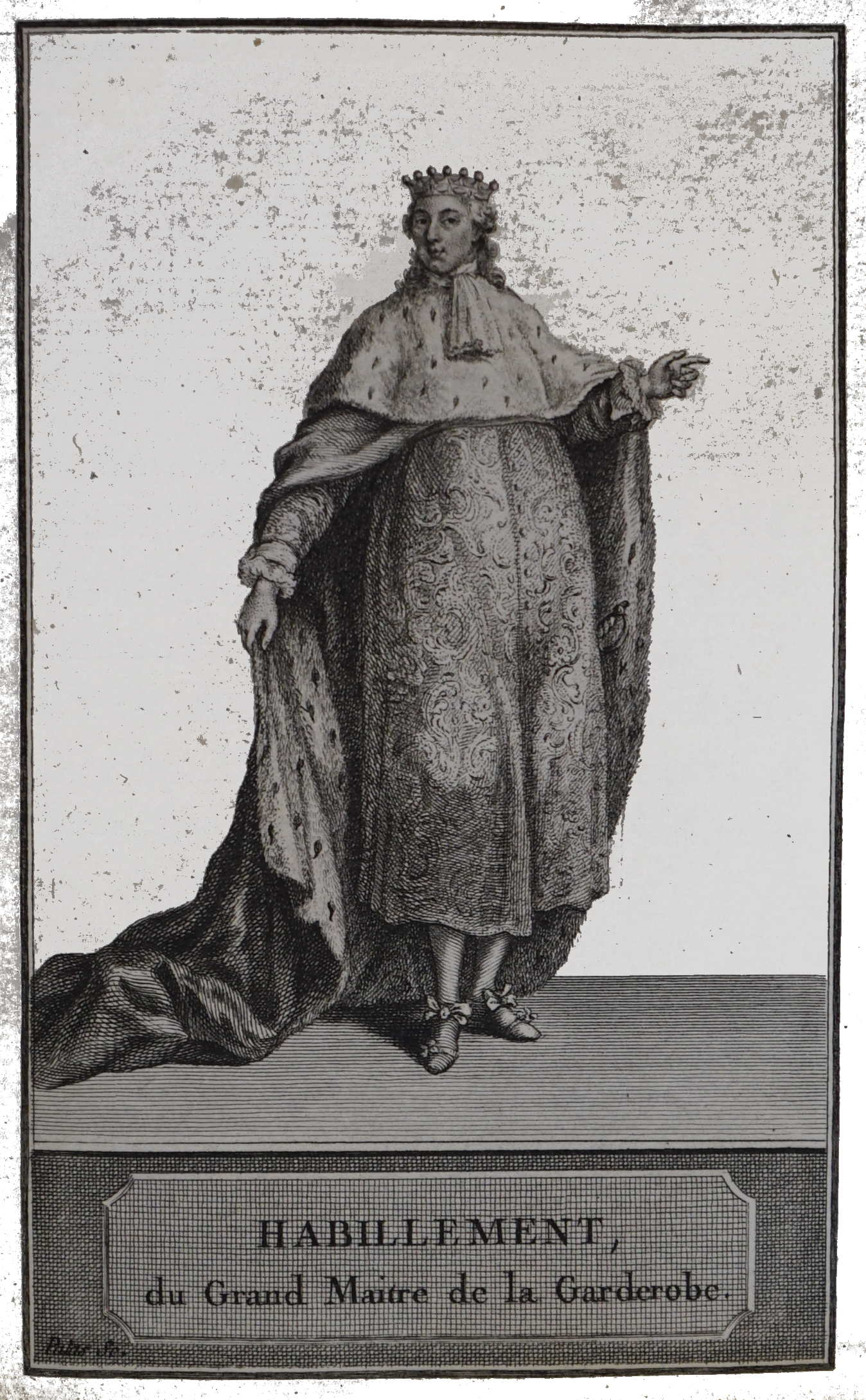 extrait du livre "Sacre et couronnement de Louis XVI ...".